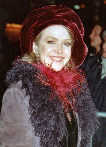 Agnès Soral, actrice française, à la cérémonie des Césars